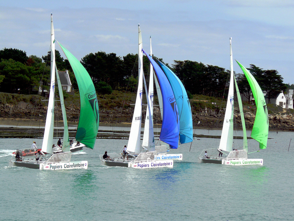 Mis au point par SailingOne ces petits catamarans aux voiles multicolores se donnent en spectacle, chaque année, dans le port de la Trinité sur Mer... Le Trophée Clairefontaine rassemble 8 grands noms de la voile qui viennent en découdre dans un vrai esprit de compétition... un vrai moment de bonheur !